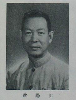 中文（台灣）: 中國人民政治協商會議第一屆全體會議代表